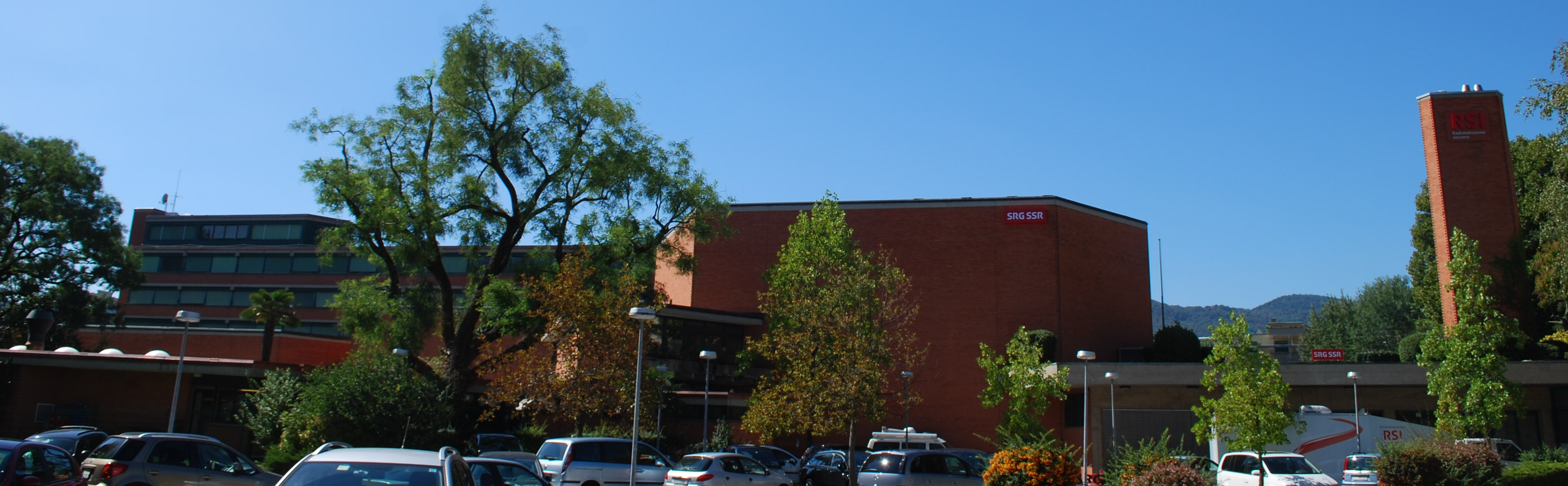 Studio radio Rsi, prospetto complesso varso sud